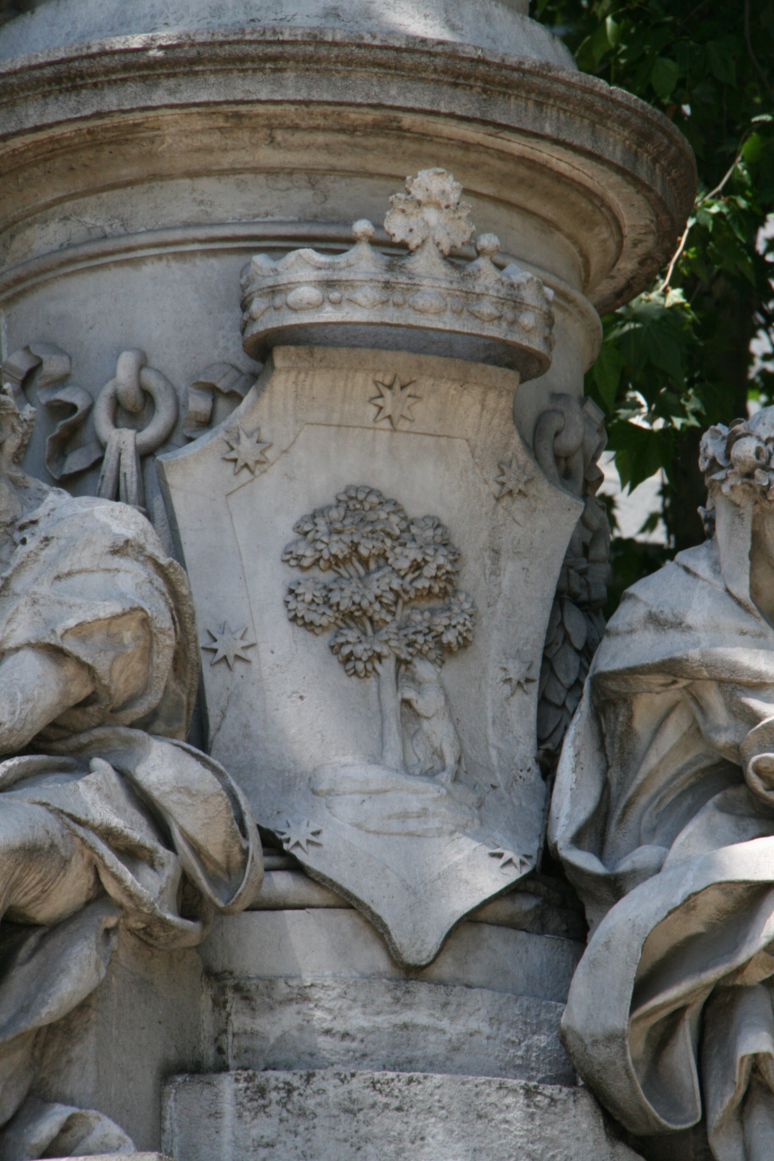 Escudo de Madrid - Fuente de Apolo en el Paseo de Prado